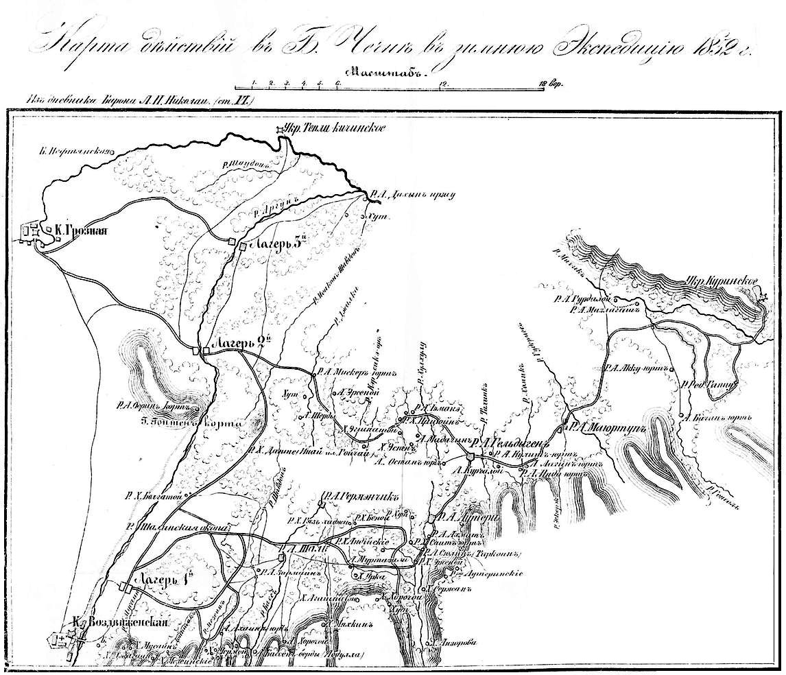 Николаи, Леонтий Павлович. Кавказская старина : [материалы для истории Кавказской войны] : выписки из дневника генерал-адъютанта барона Леонтия Павловича Николаи : Вып. 1-14 / Леонтий Павлович Николаи. - Тифлис : Тип. гл. упр. Наместника Кавк., 1872-1874.